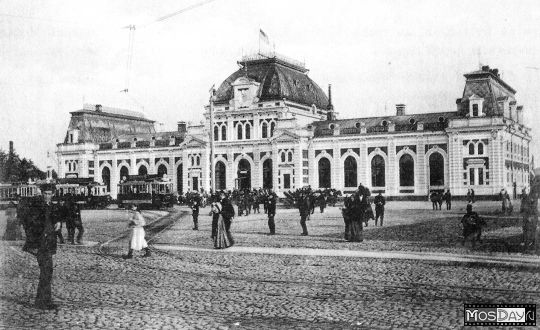 Павелецкий вокзал Paveletsky Rail Terminal